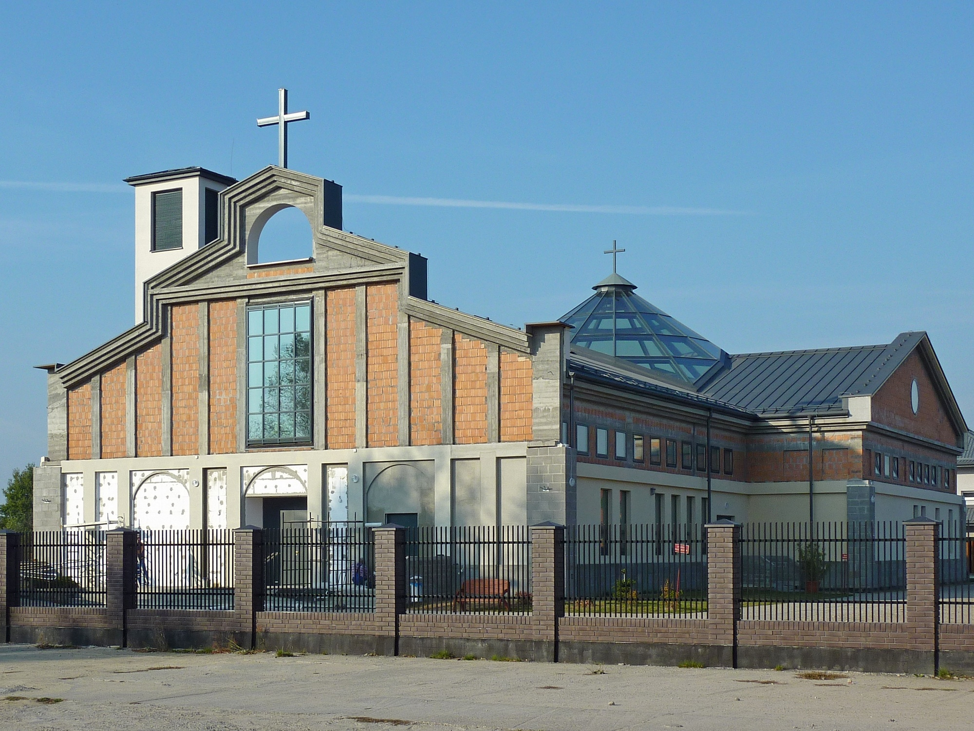 Kościół Matki Bożej Królowej Rodzin w Dziekanowie Leśnym.